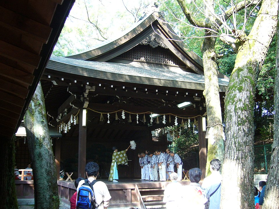 服部住吉神社（大阪府豊中市）の能舞台。例大祭の宮入り祓。